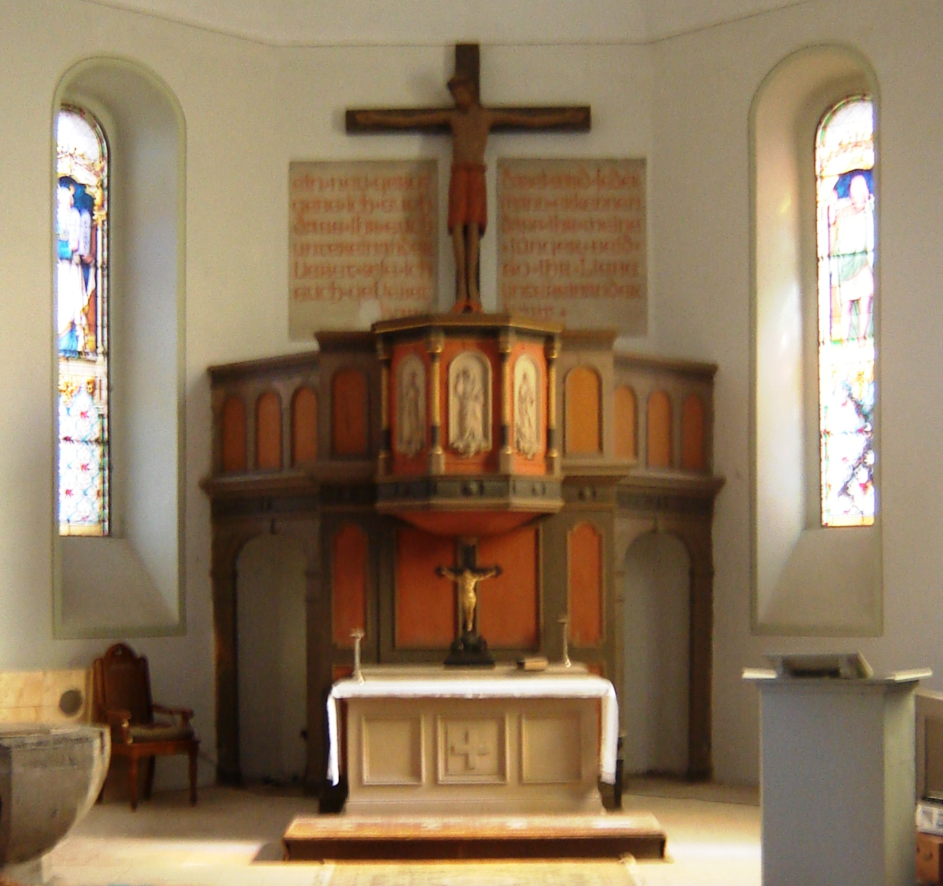 Unseburg (Sachsen-Anhalt), St.-Stephani-Kirche, Altar